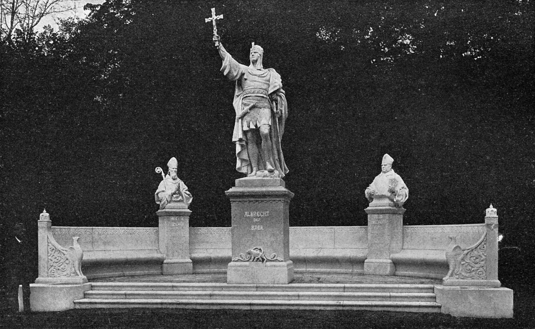 auf der Berliner Siegesallee.